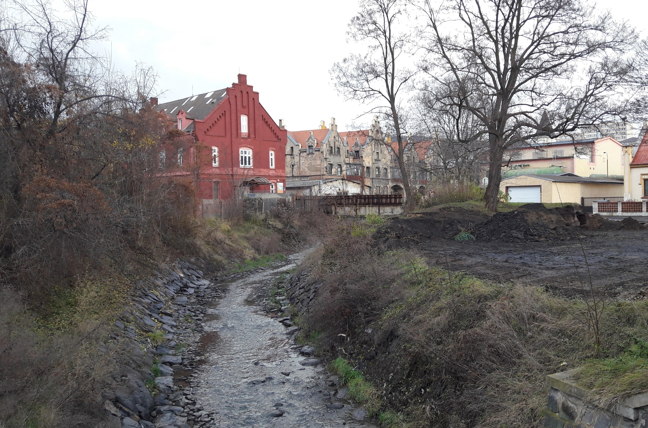 Ústí nad Labem - Klíšský potok, ulice U Chemičky.